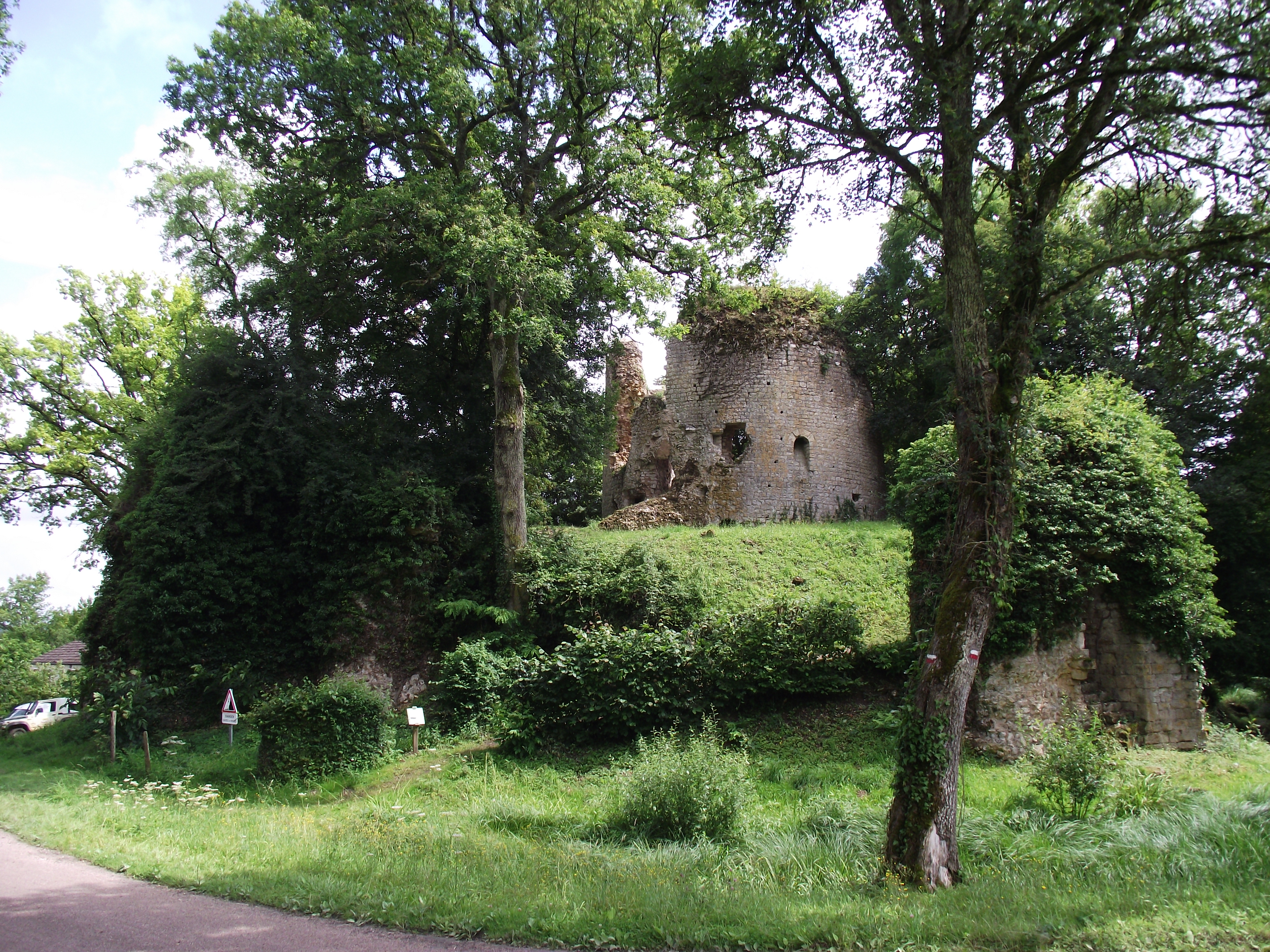 Donjon de Saint-Vérain (Nièvre, Bourgogne)